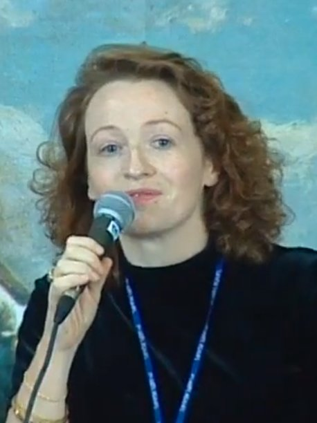 Extrait de la vidéo d'un café littéraire au Festival Étonnants Voyageurs 1999 avec Annick Cojean, animé par Maëtte Chantrel, Christian Rolland.